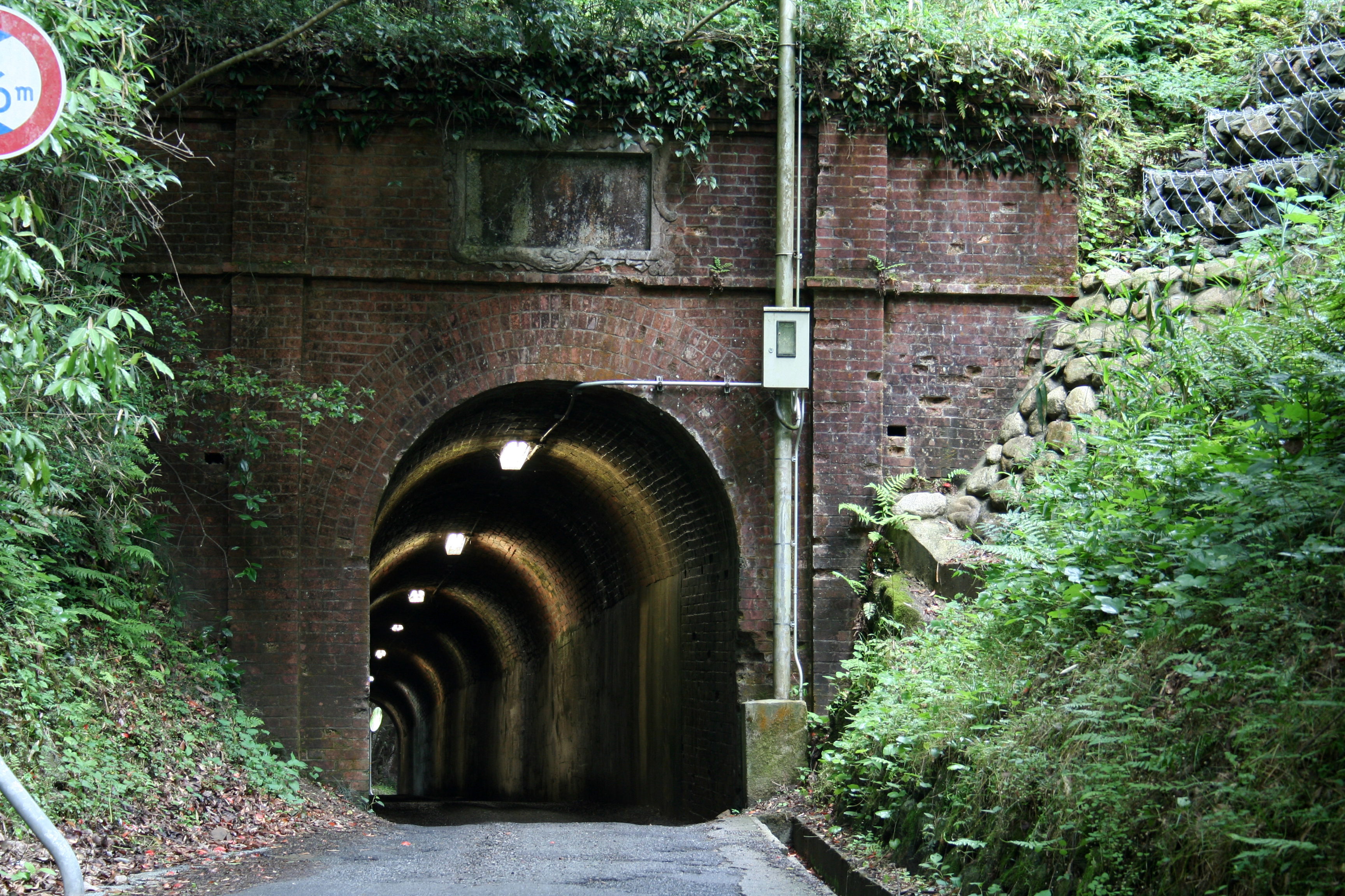 兵庫県道80号宍粟香寺線。県道の写真を西から東へ移動中に撮影。 相坂トンネル。西側正面。